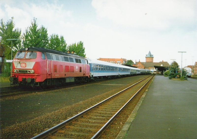 D-Zug in Cuxhaven